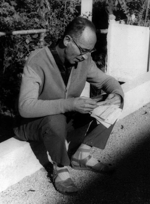 photo contenue dans le livre d'or 1961 du F.I.E.F. (foyer international d'études françaises 26160 La Bégude-de-Mazenc), scannée et offerte par son directeur Alain Corre le 06/10/2010